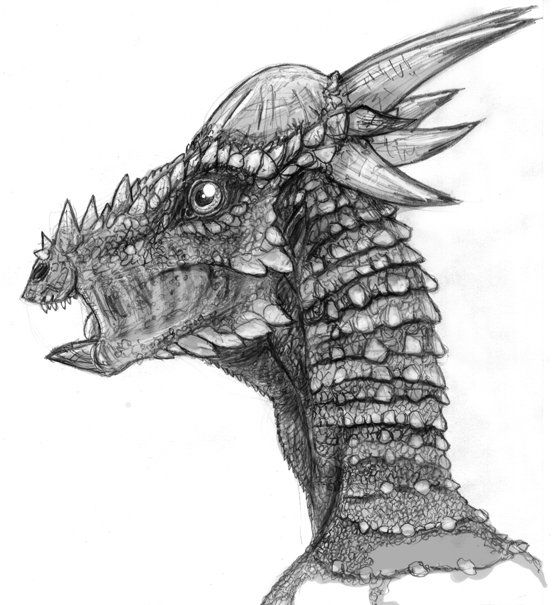 Reconstrucción de un busto de Stygimoloch